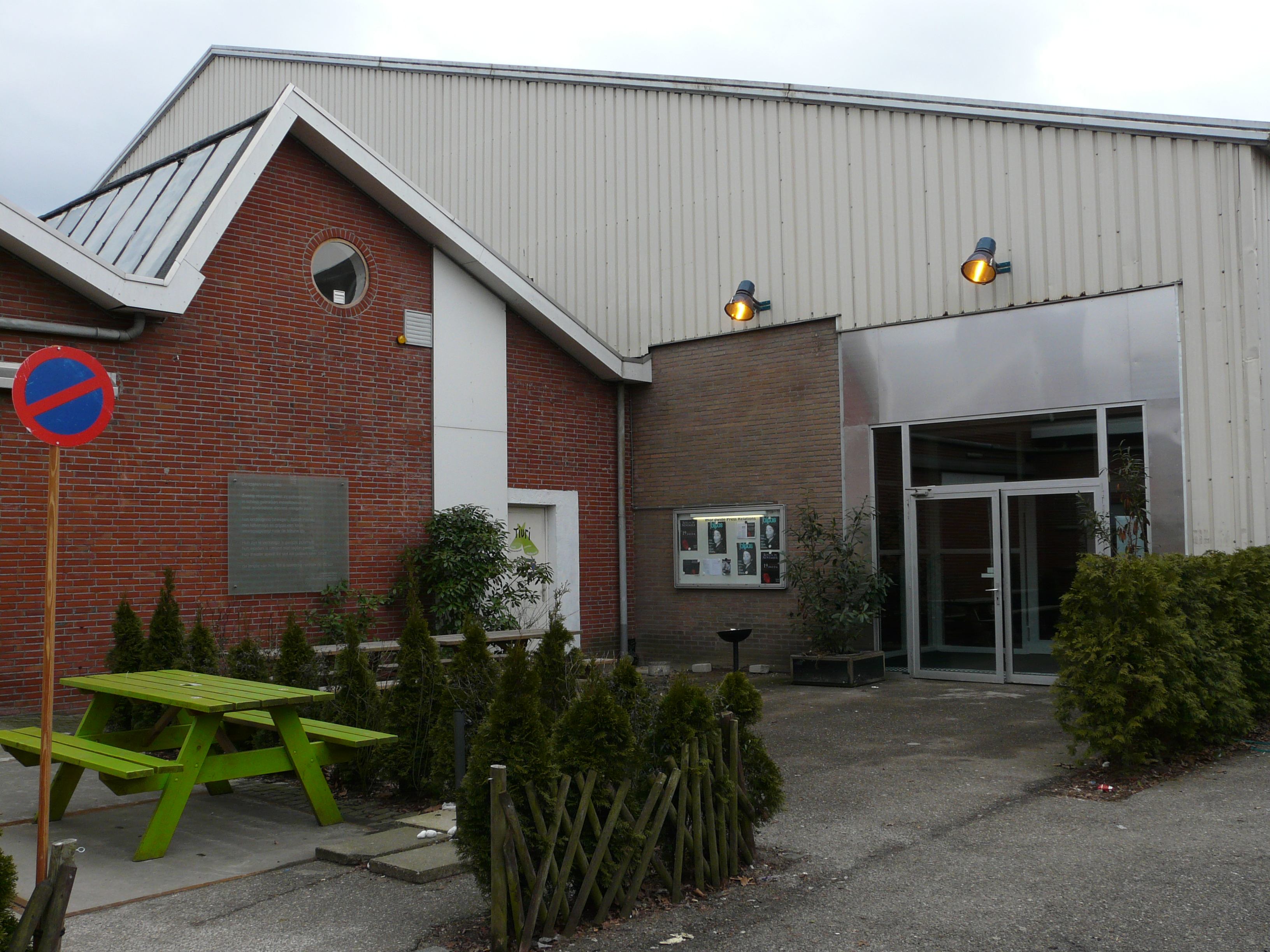 Zicht op een deel van Podium Bloos, Speelhuislaan 153, 4815 CD Breda. Gelegen aan het begin van de Speelhuislaan in de wijk de Belcrum in het noorden van Breda